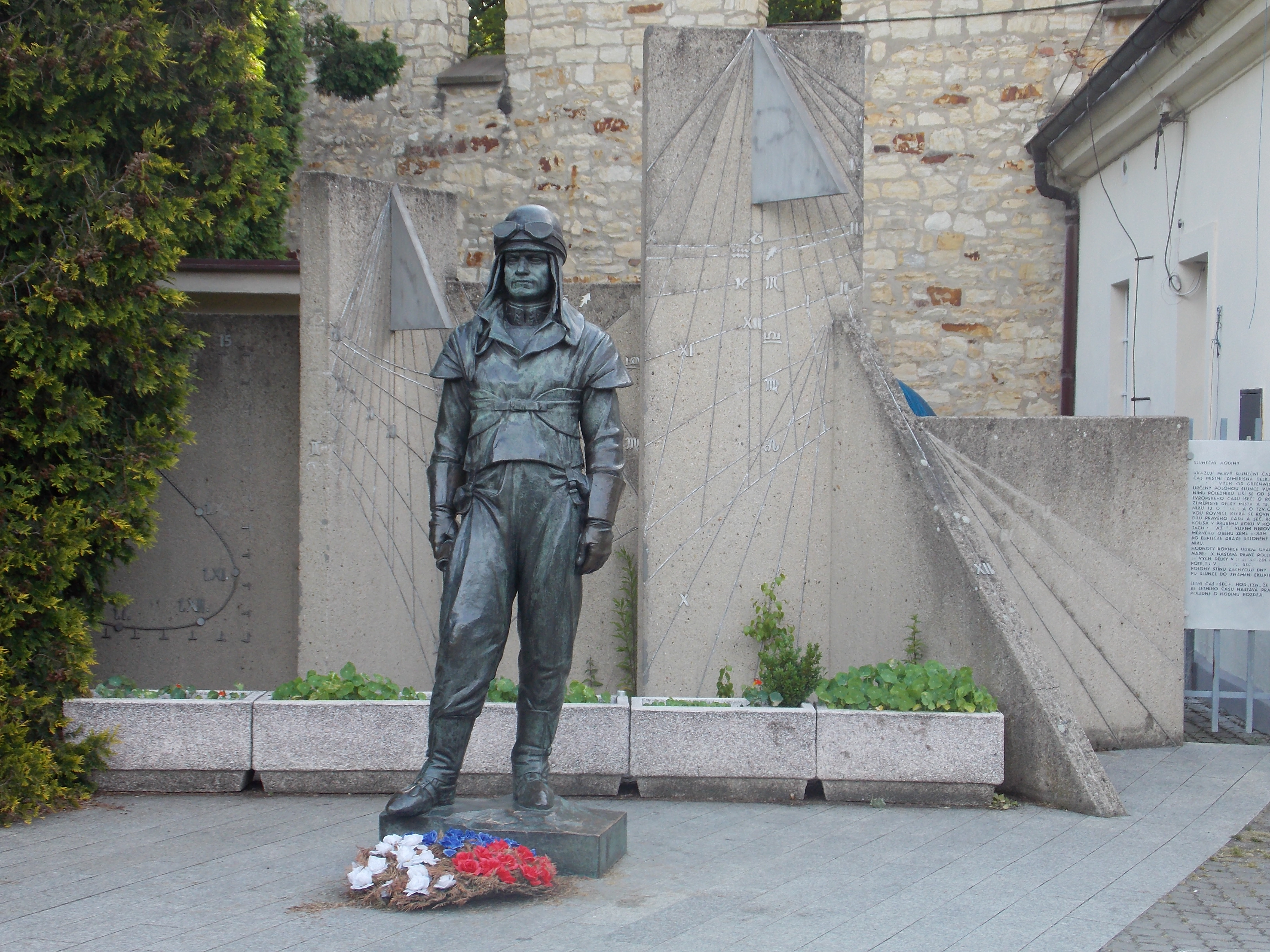 Pomník Milana Rastislava Štefánika na Petříně, Růžový sad na Petříně, u vstupu do Štefánikovy hvězdárny, Hradčany.